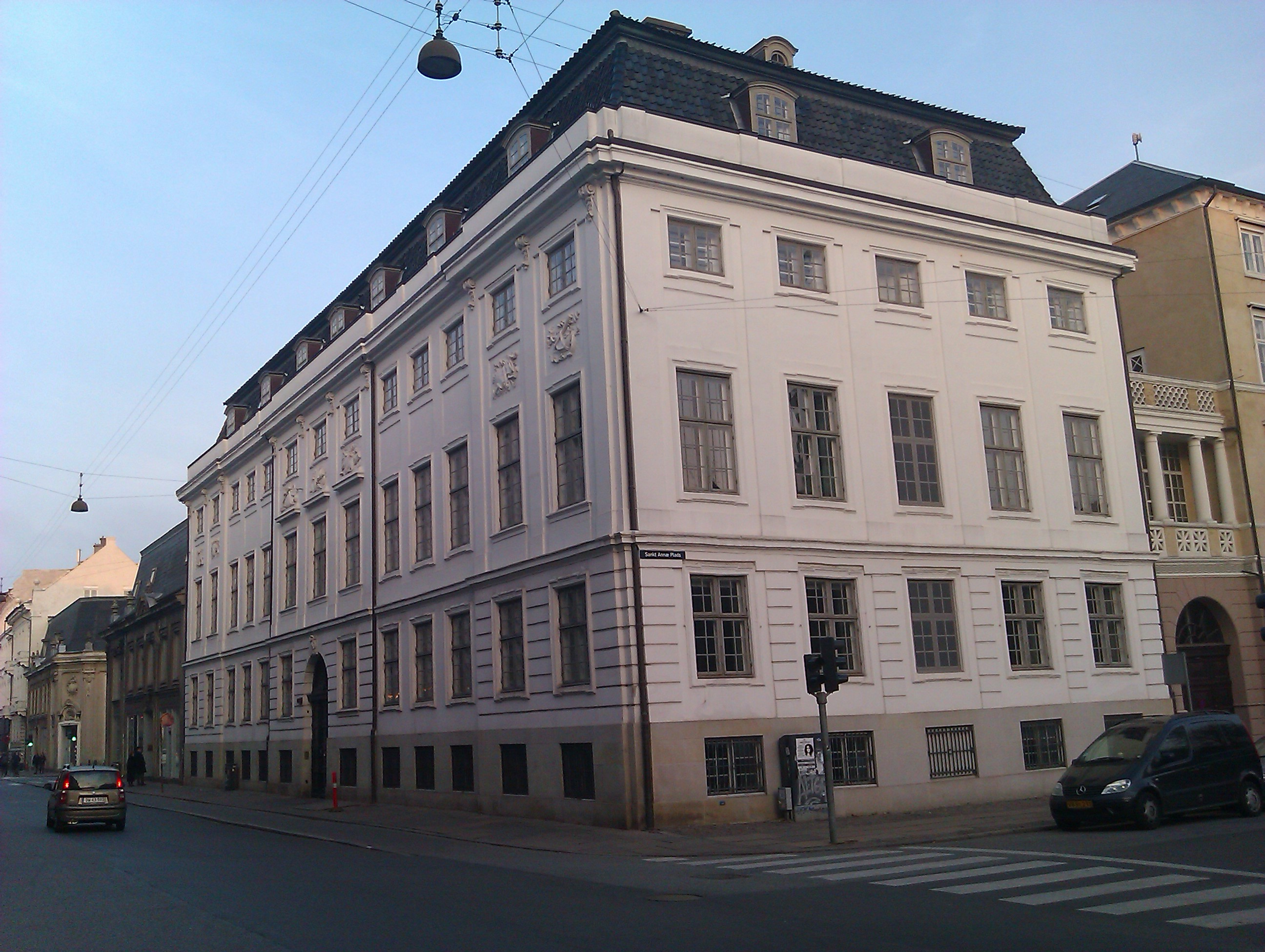 Lindencrones Palæ, på hjørnet af Bredgade og Sankt Annæ Plads, København